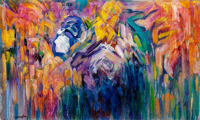 Walter Baldessarini Iris 60x100cm 2016